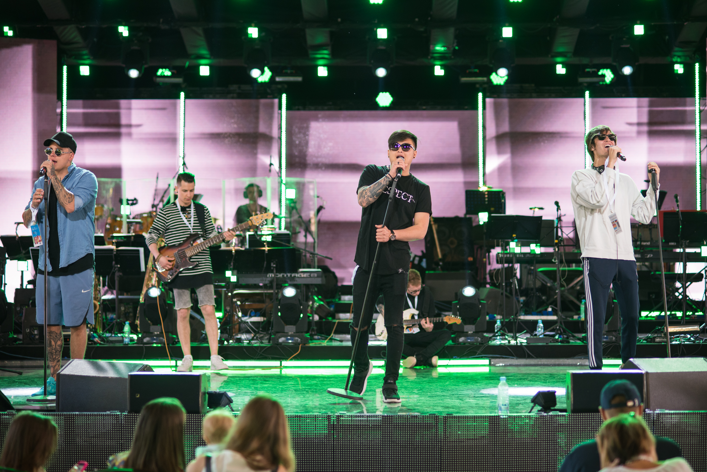 MBAND на репетиции фестиваля «Лайма. Рандеву. Юрмала 2017»